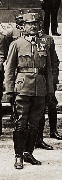 Feldmarschalleutnant Georg Schariczer de Rény bei der 180. Promotion in der Geschichte des Militär-Maria-Theresien-Ordens am 17. August 1917 im Schloss Wartholz. Es handelt sich hierbei um einen Ausschnitt aus einem Gruppenfoto.